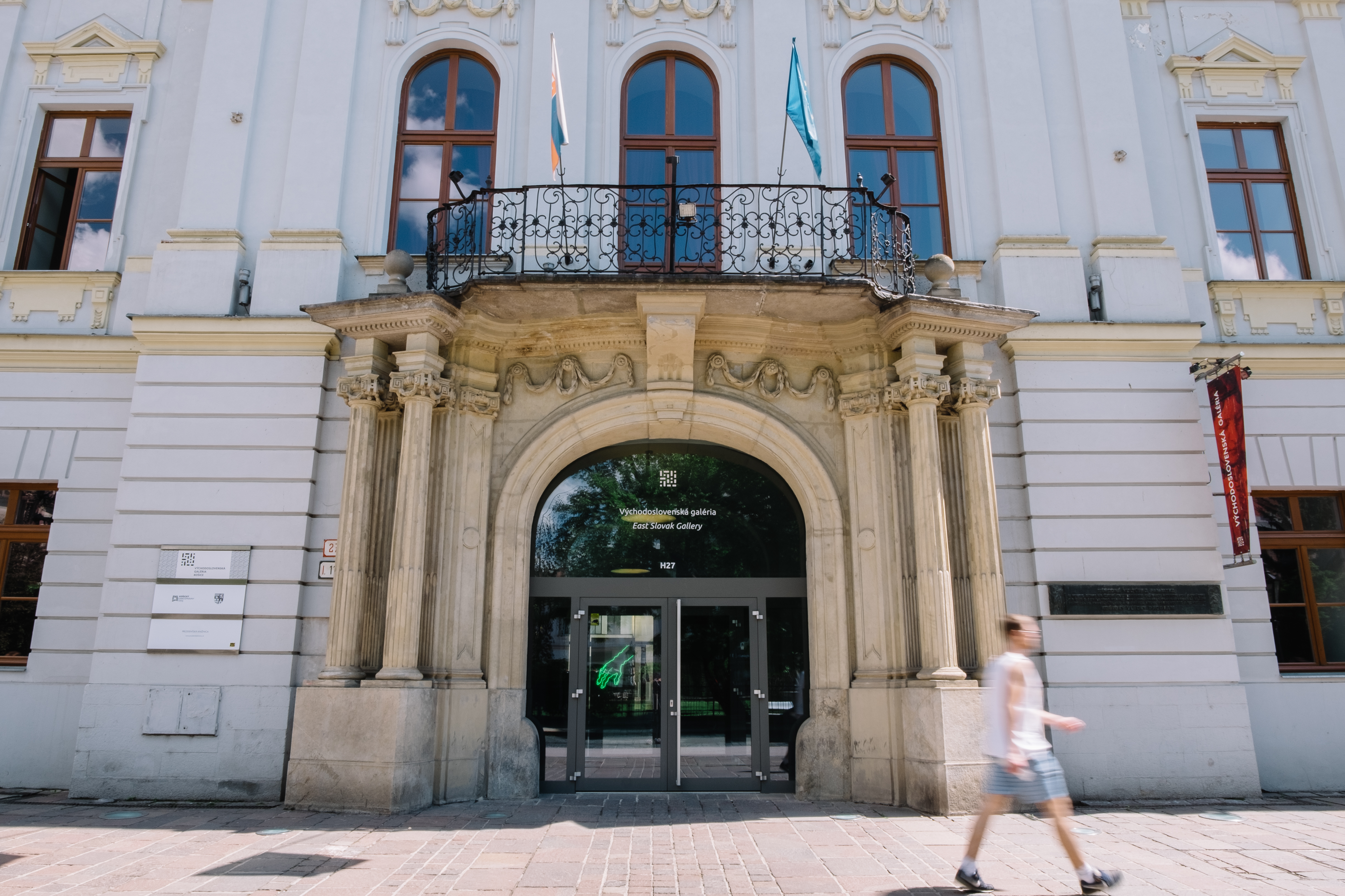 Východoslovenská galéria Hlavná 27